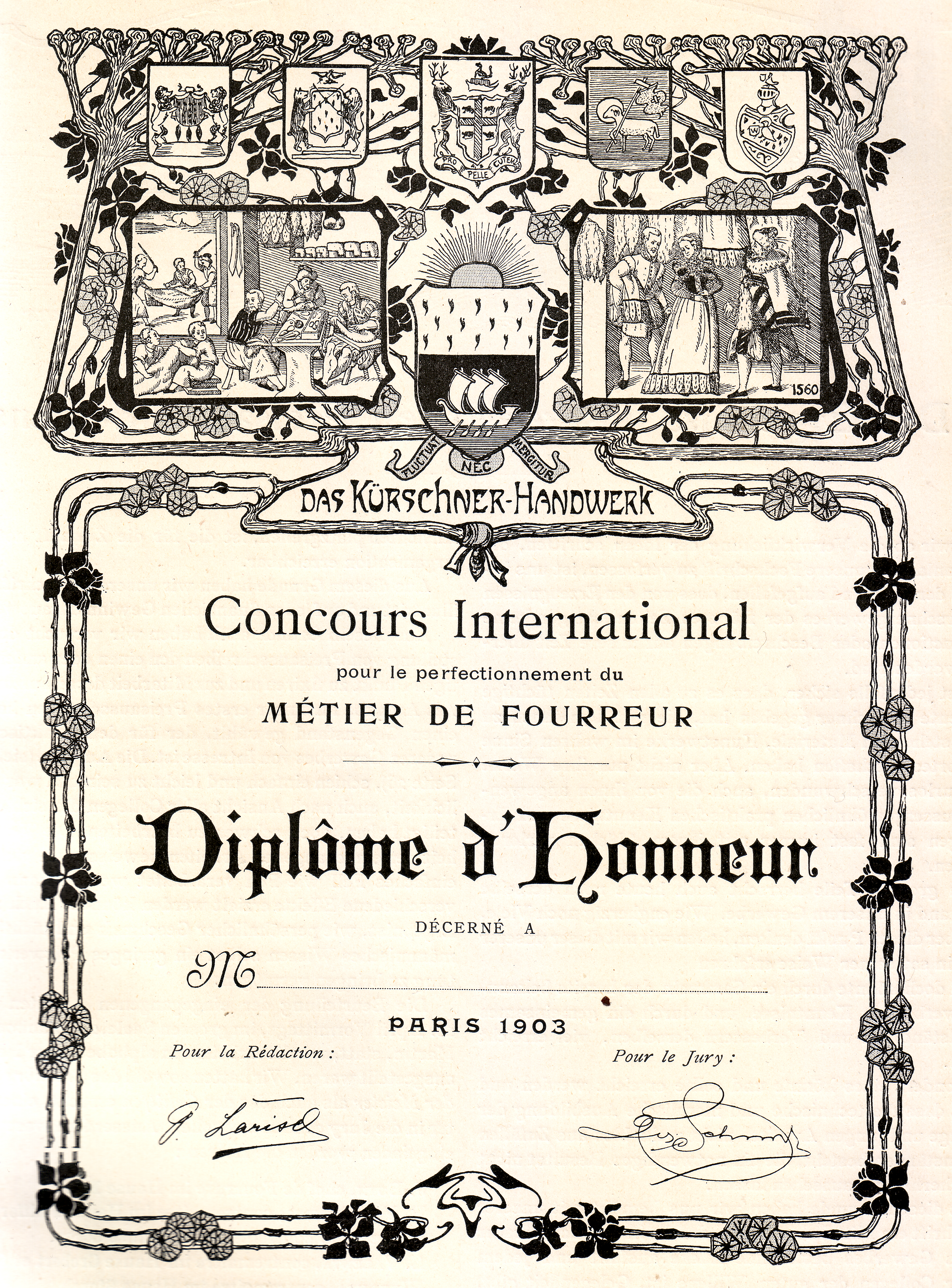 Concours International pour le perfectionnement du Métier de Fourreur - Diplôme d'Honneur, Paris 1903.